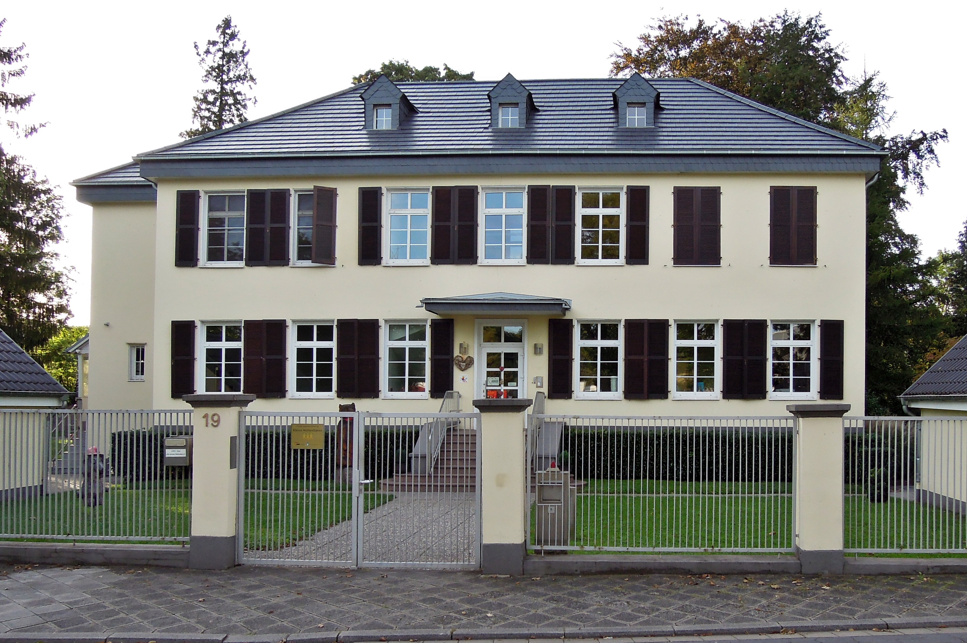 Direktorenvilla de Papiermühlenbesitzers Jean Louis Piette